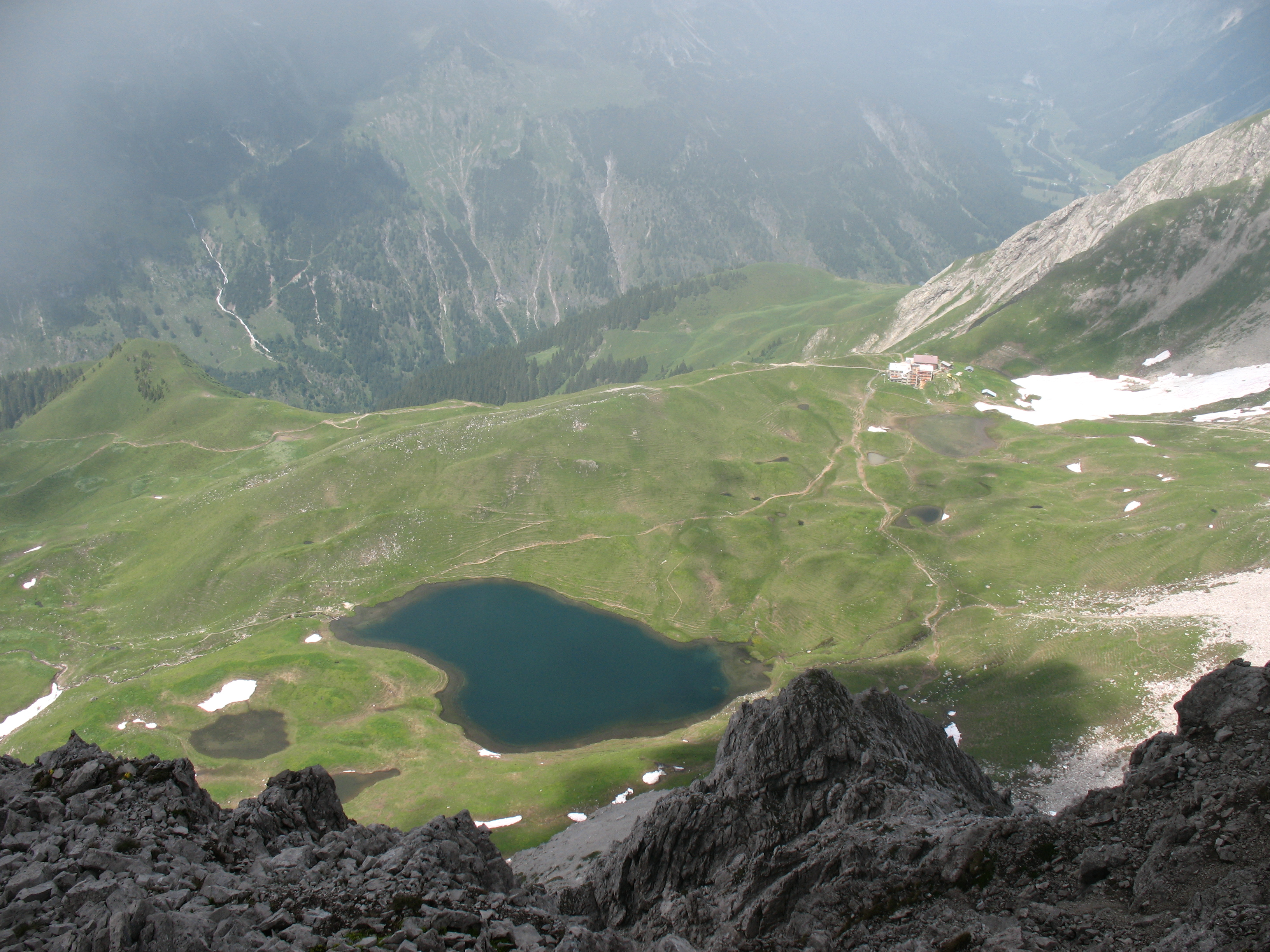 Blick vom Rappenseekopf (2468 m) auf das Kar mit den Rappenseen (2047 m) und der Rappenseehütte (2091 m).